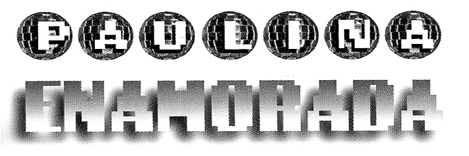 Logo del segundo de Planeta Paulina